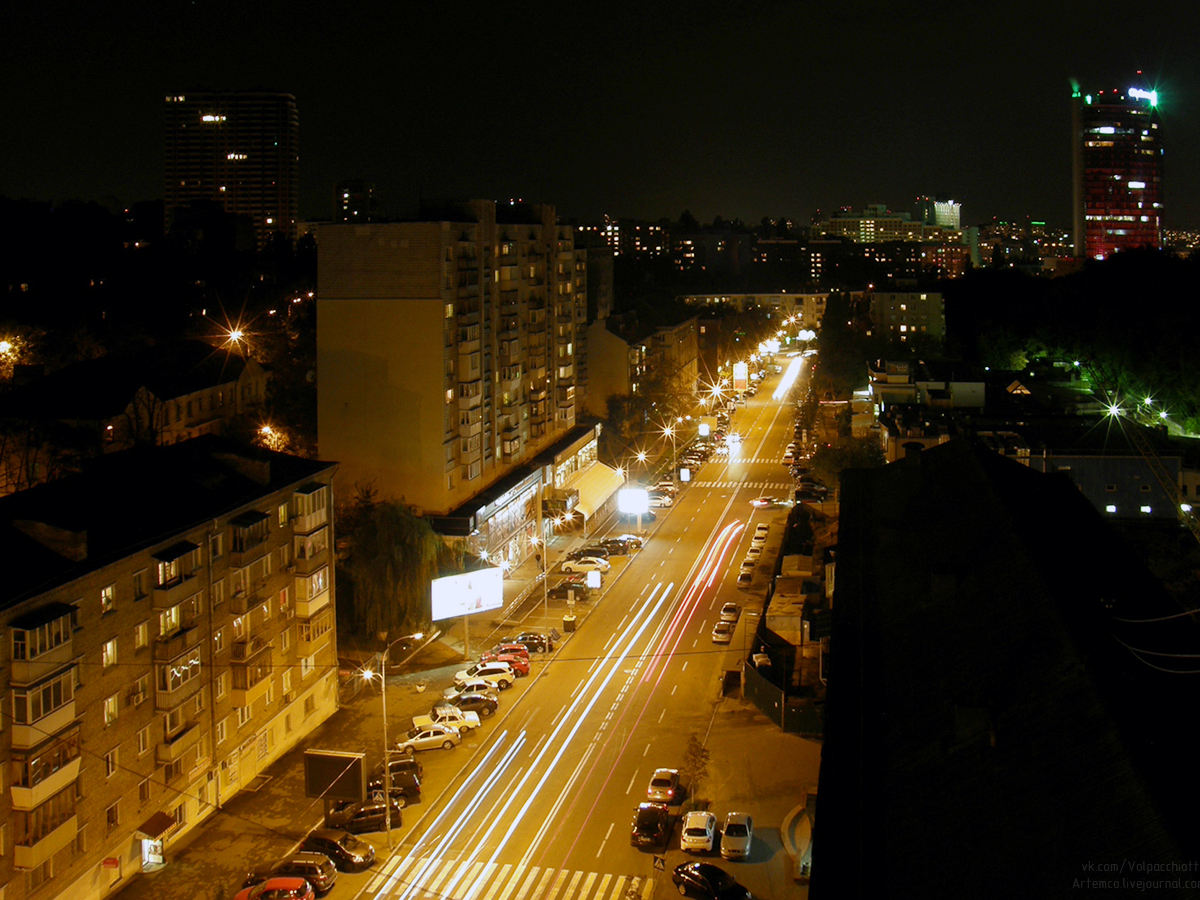 улица Мечникова ночью